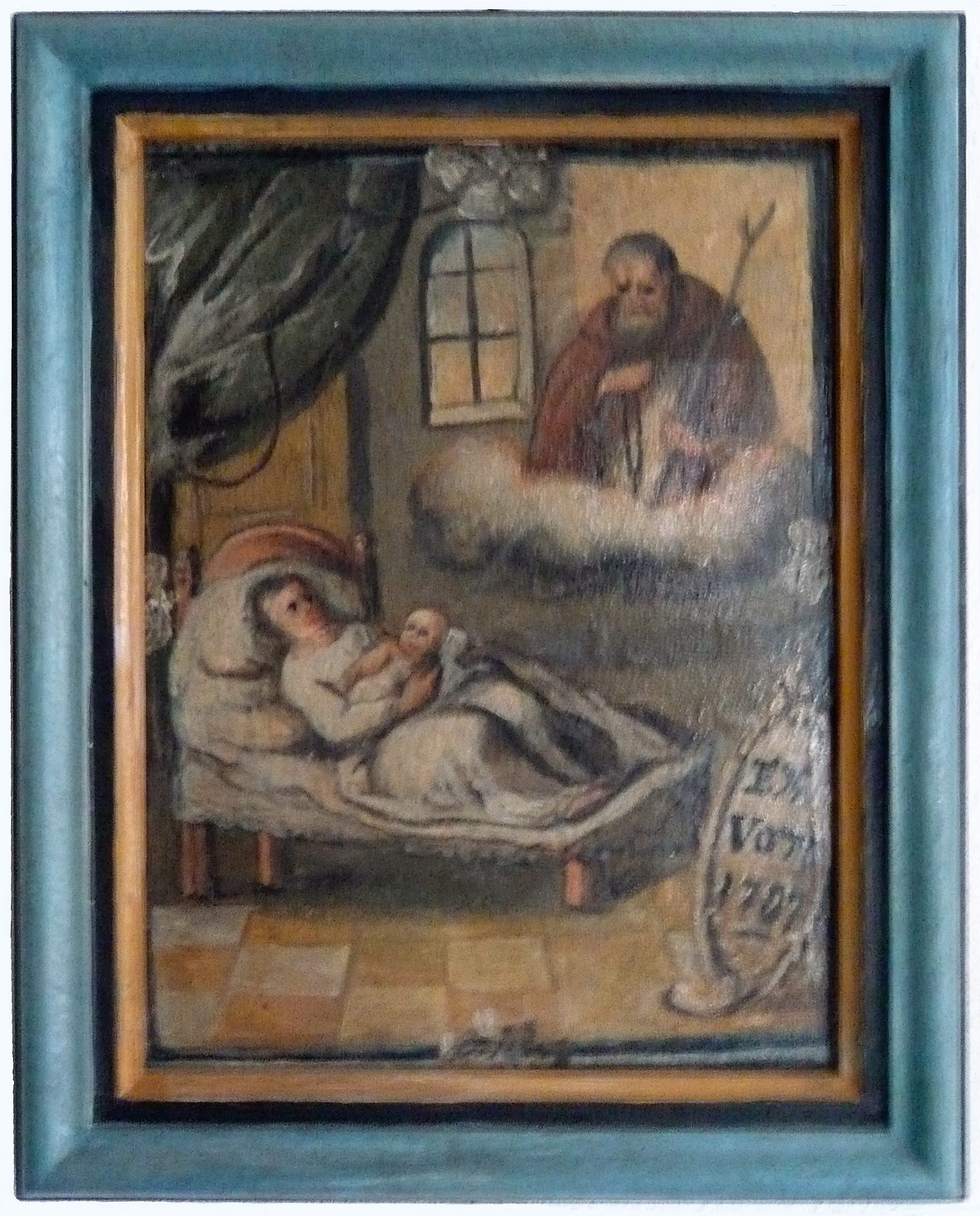 Votivbild: Bruder Georg-Kapelle, Pfronten-Kreuzegg, Landkreis Ostallgäu